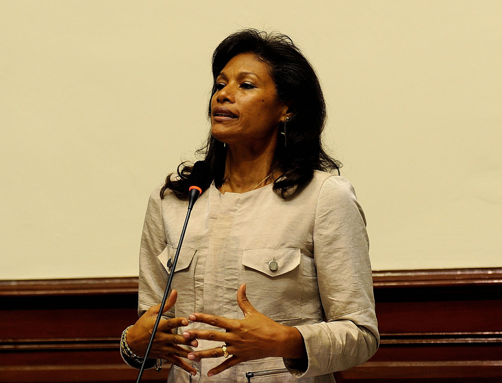 La parlamentaria Cecilia Tait Villacorta, durante la sesión vespertina efectuada por el Pleno, en el cual fijó su posición respecto a uno de los temas en debate.